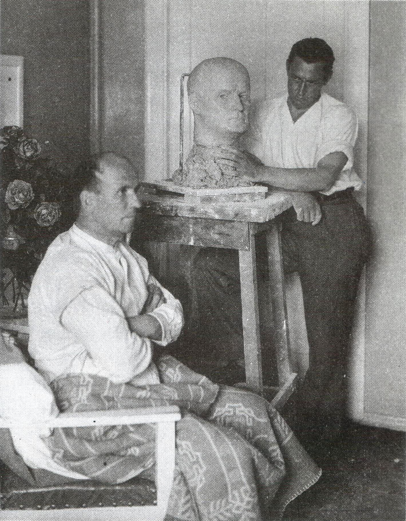 Kuvanveistäjä Mauno Oittinen veistämässä Vihtori Kosolan muotokuvaa.